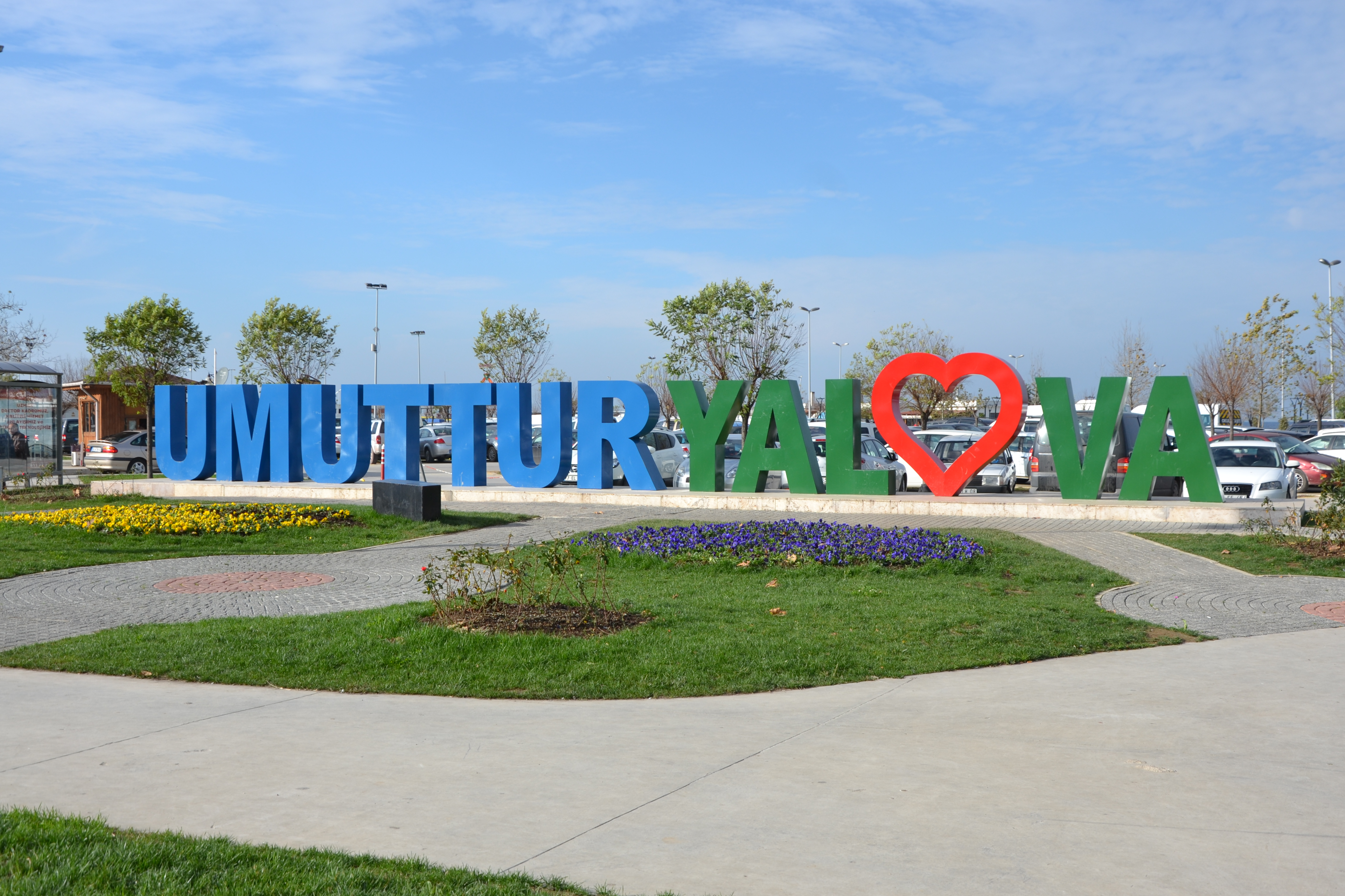 Yalova merkezinde bulunan Umuttur Yalova yazısı